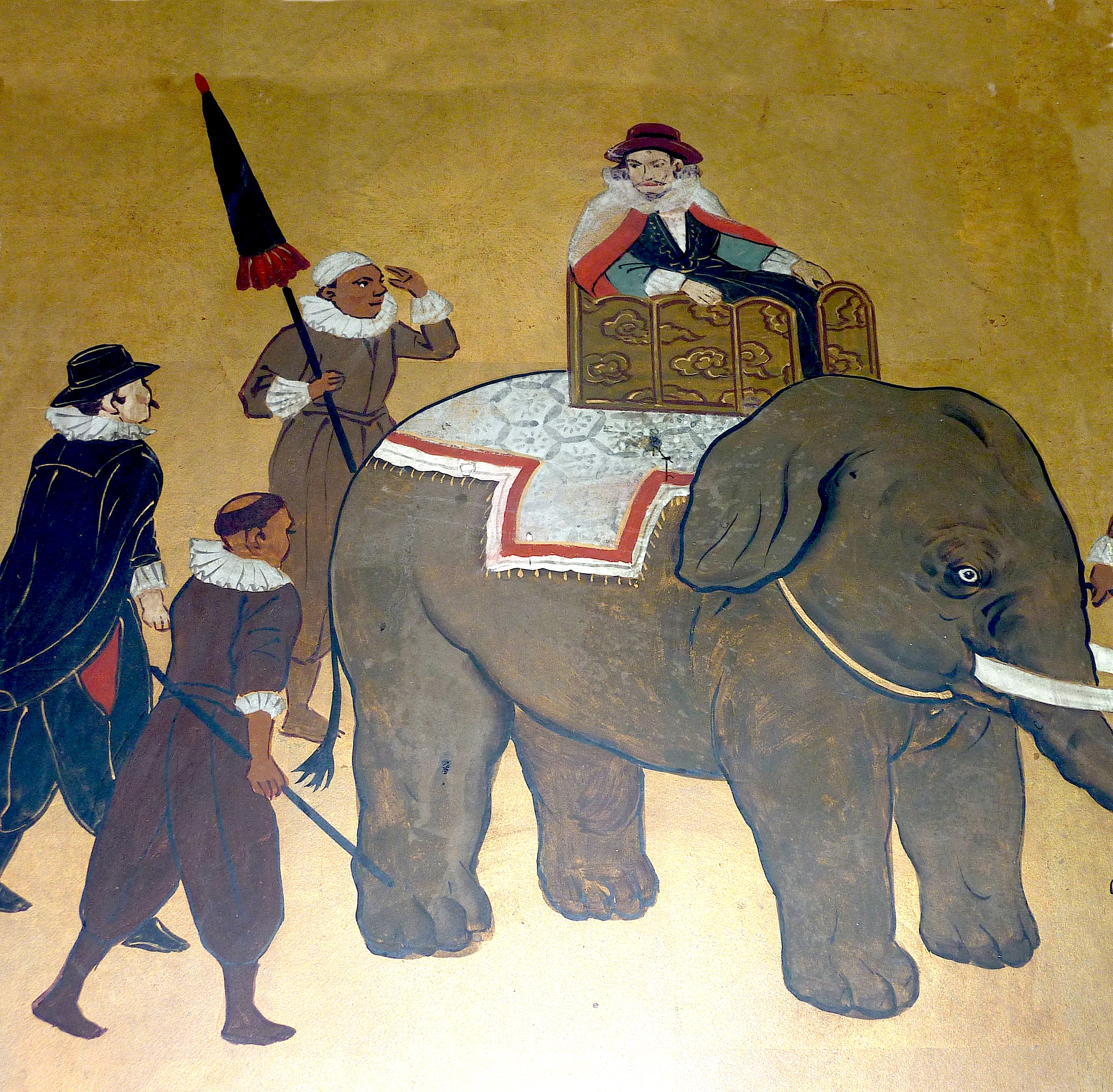 portugais sur un éléphant. Art namban